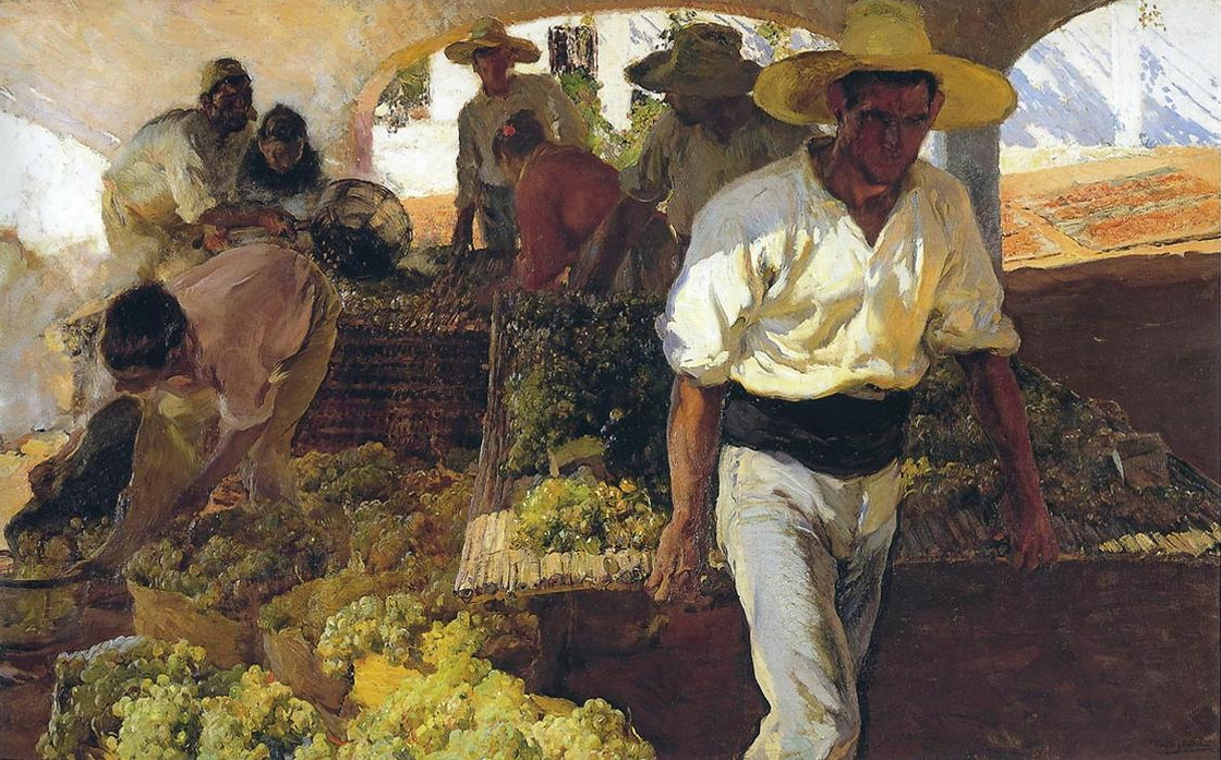 Preparación de la pasa ( transportando la uva , Jávea ) óleo sobre lienzo 125 x 200 cm Museo de Bellas Artes, Oviedo